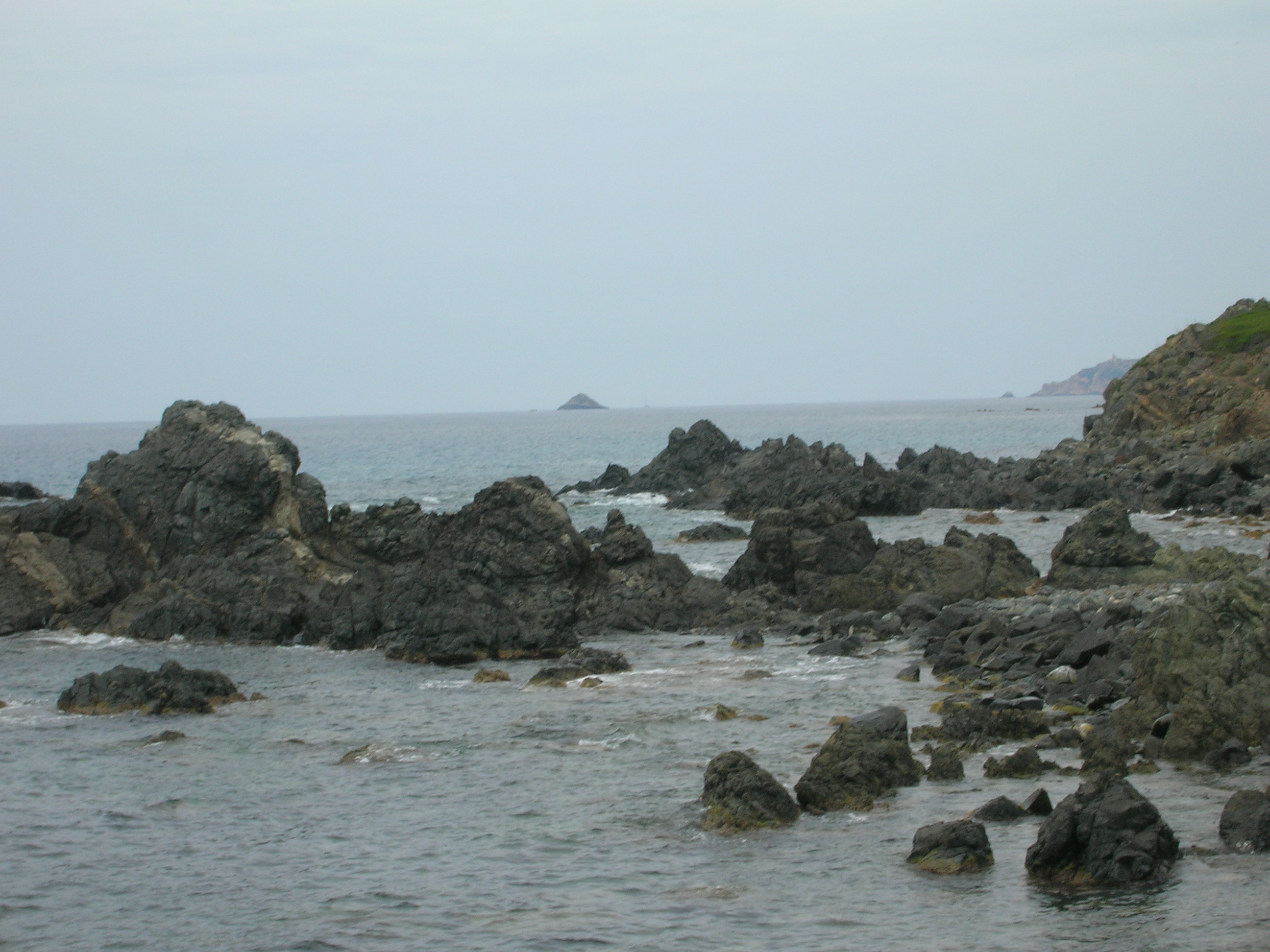 Mierlandschafr bei den Iles sanguinieres.